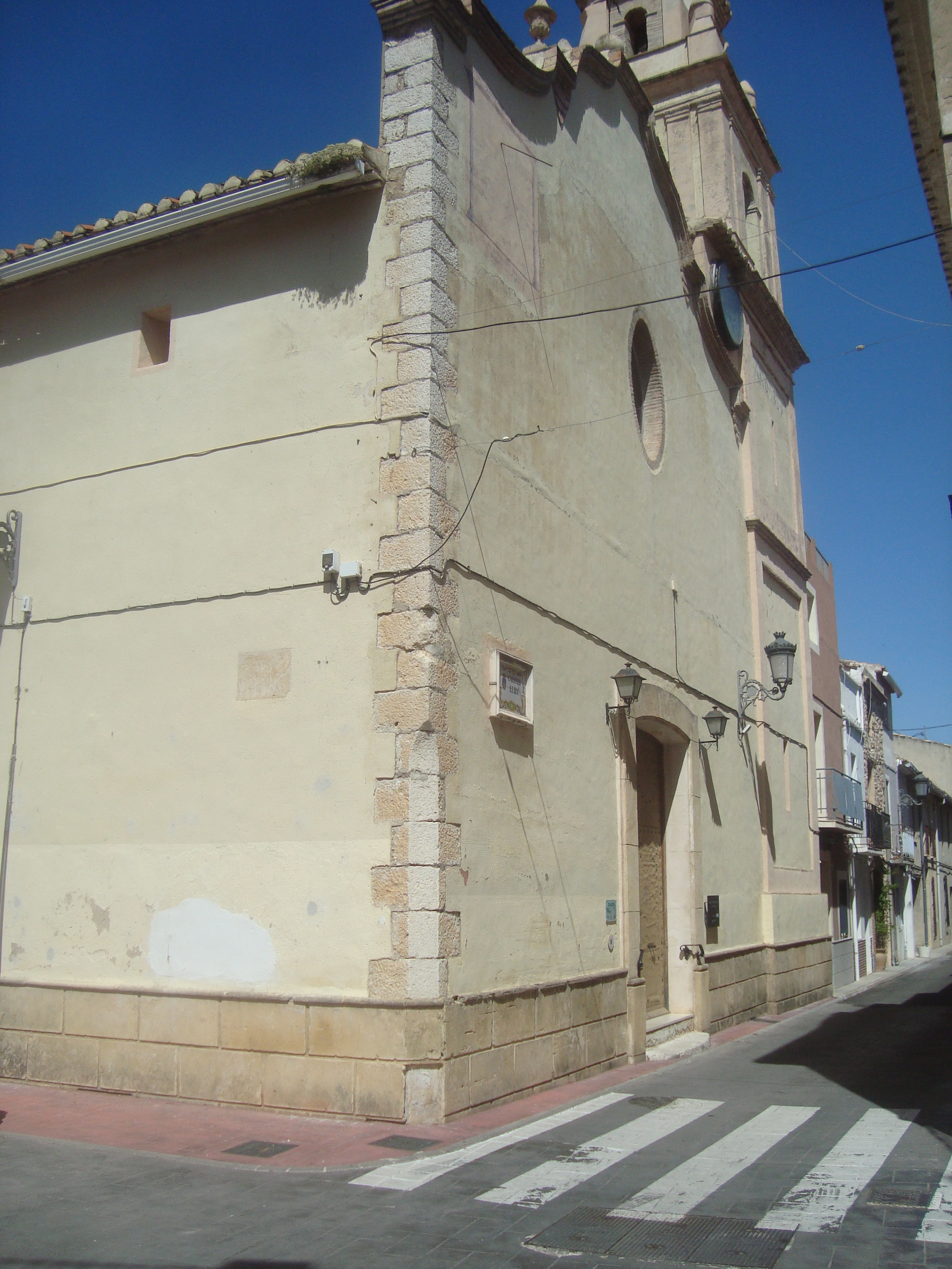 Església parroquial de Sant Josep (Benigembla) 30.029-003.